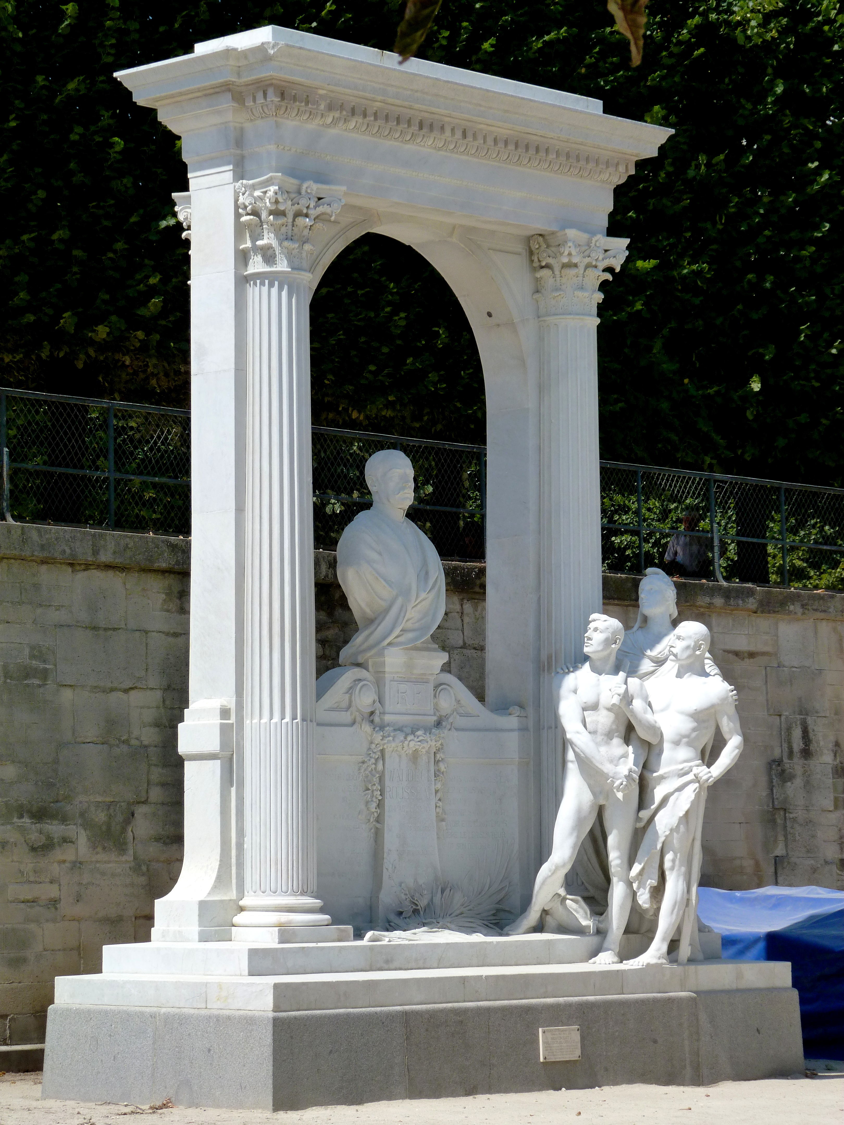 Monument à Waldeck-Rousseau, souscription nationale. Sculpture deLaurent Honoré Marqueste, marbre, 1909. Jardin des Tuileries (coté Rivoli, extrémité ouest), Paris. Une victoire ailée en bronze doré qui complétait le monument a été refondu lors de l'occupation allemande. Laurent Marqueste (1848–1920) Alternative names Laurent-Honoré MarquesteDescriptionFrench sculptorDate of birth/death 12 June 1848 5 April 1920 Location of birth/death Toulouse ParisAuthority control : Q1971720 VIAF: 24869129 ISNI: 0000 0000 6657 1501 ULAN: 500052968 SUDOC: 158899008 BNF: 148464412 creator QS:P170,Q1971720